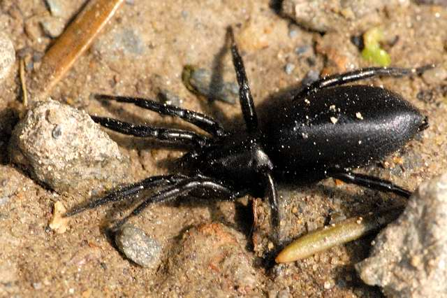 Zelotes latreillei from Commanster, Belgian High Ardennes .